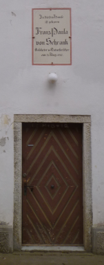 Franz von Paula Schrank (Gedenktafel in Vornbach)